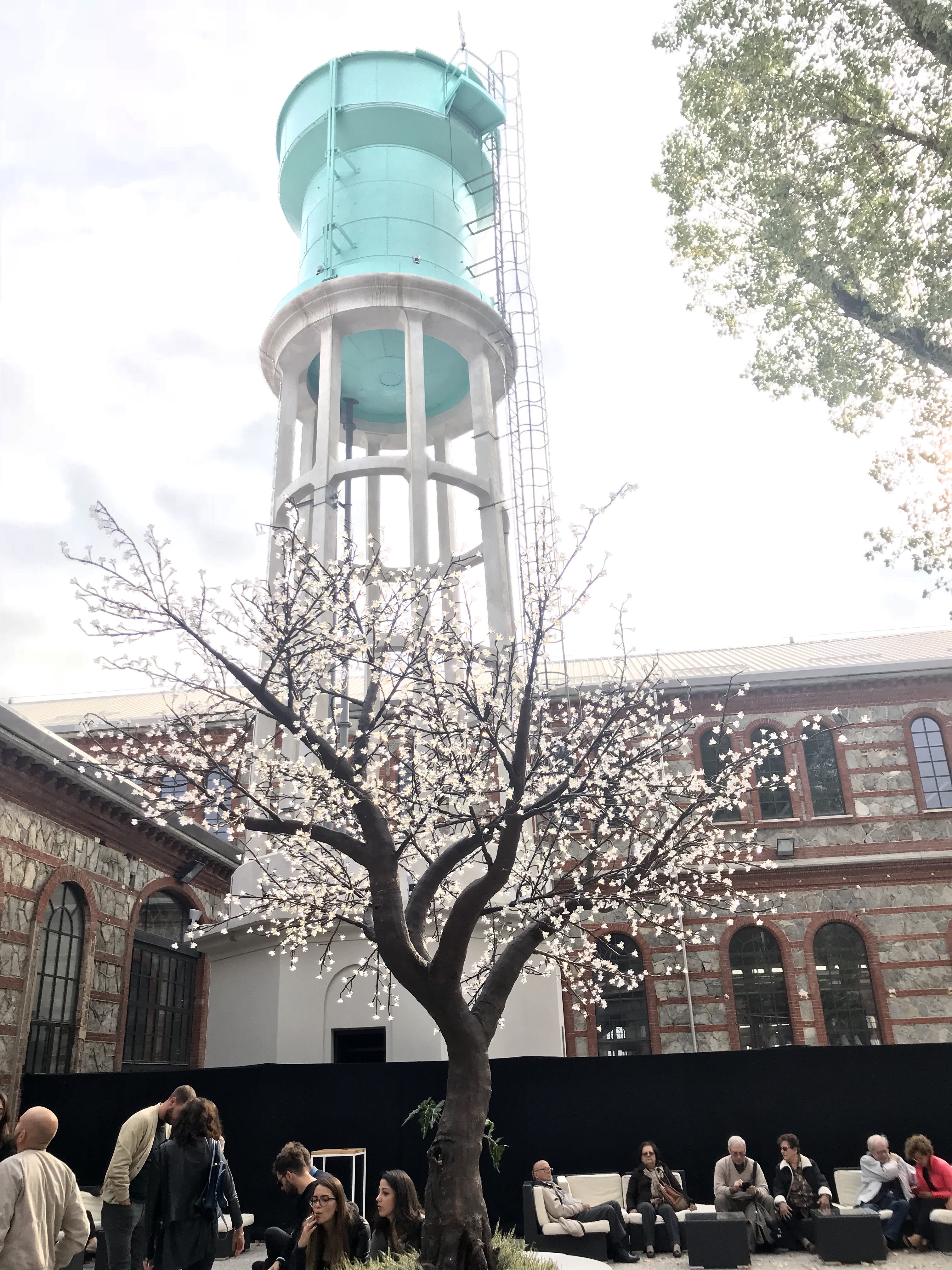 Inaugurazione EX OGR 2017